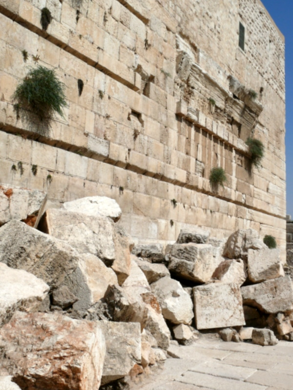 Robinsons Bogen: Jerusalem. Tempelberg. Südwest Mauer.